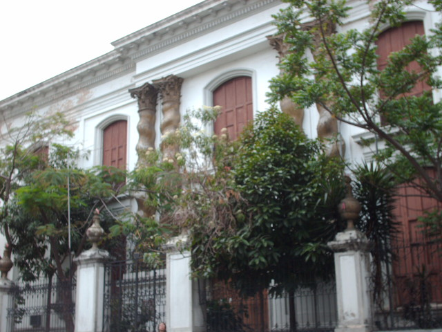 Templo Masónico de Caracas, ubicado en el centro de esa ciudad.